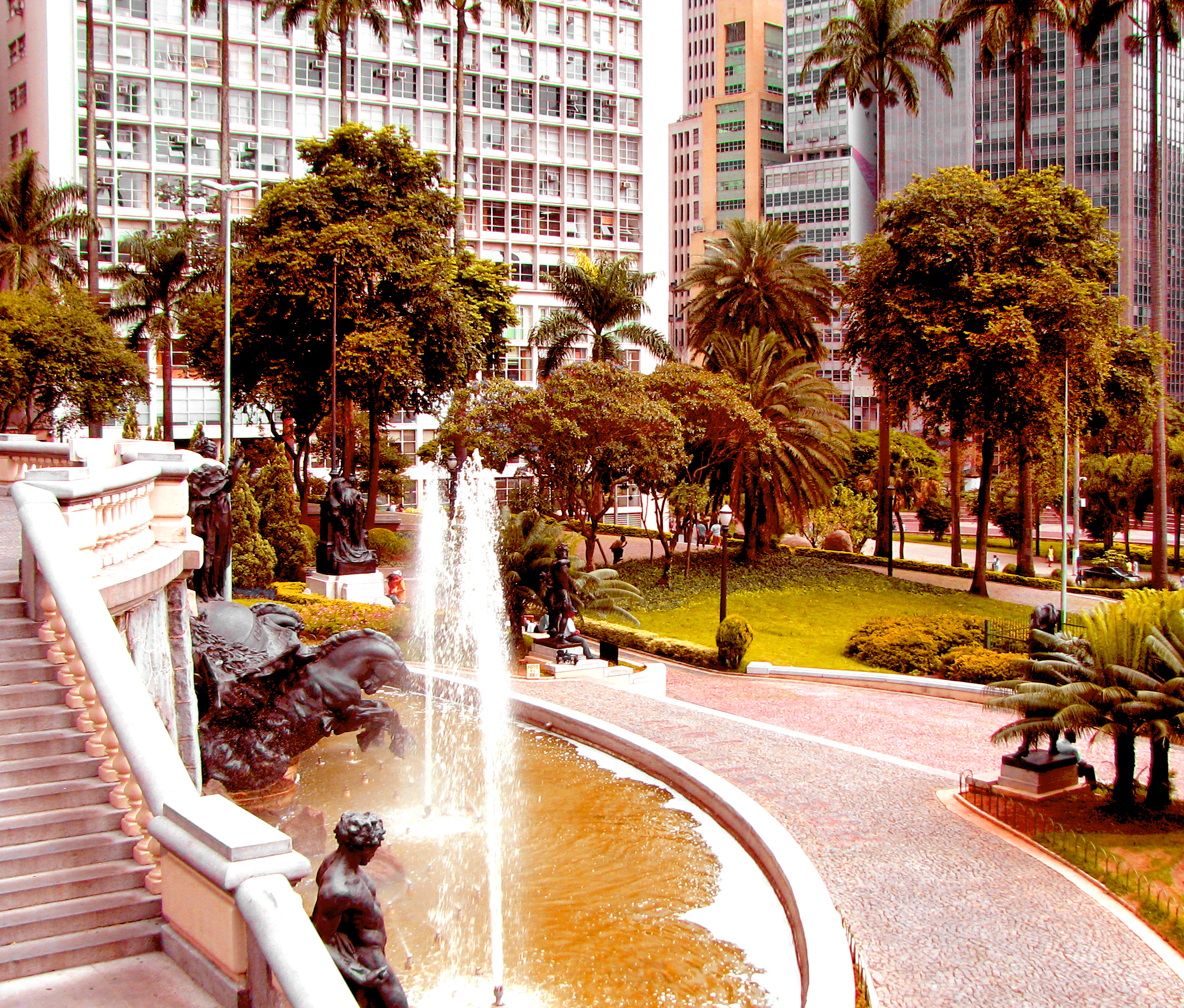 Praça Ramos de Azevedo, em São Paulo, no Brasil. Outra versão da mesma imagem pode ser encontrada no Flickr